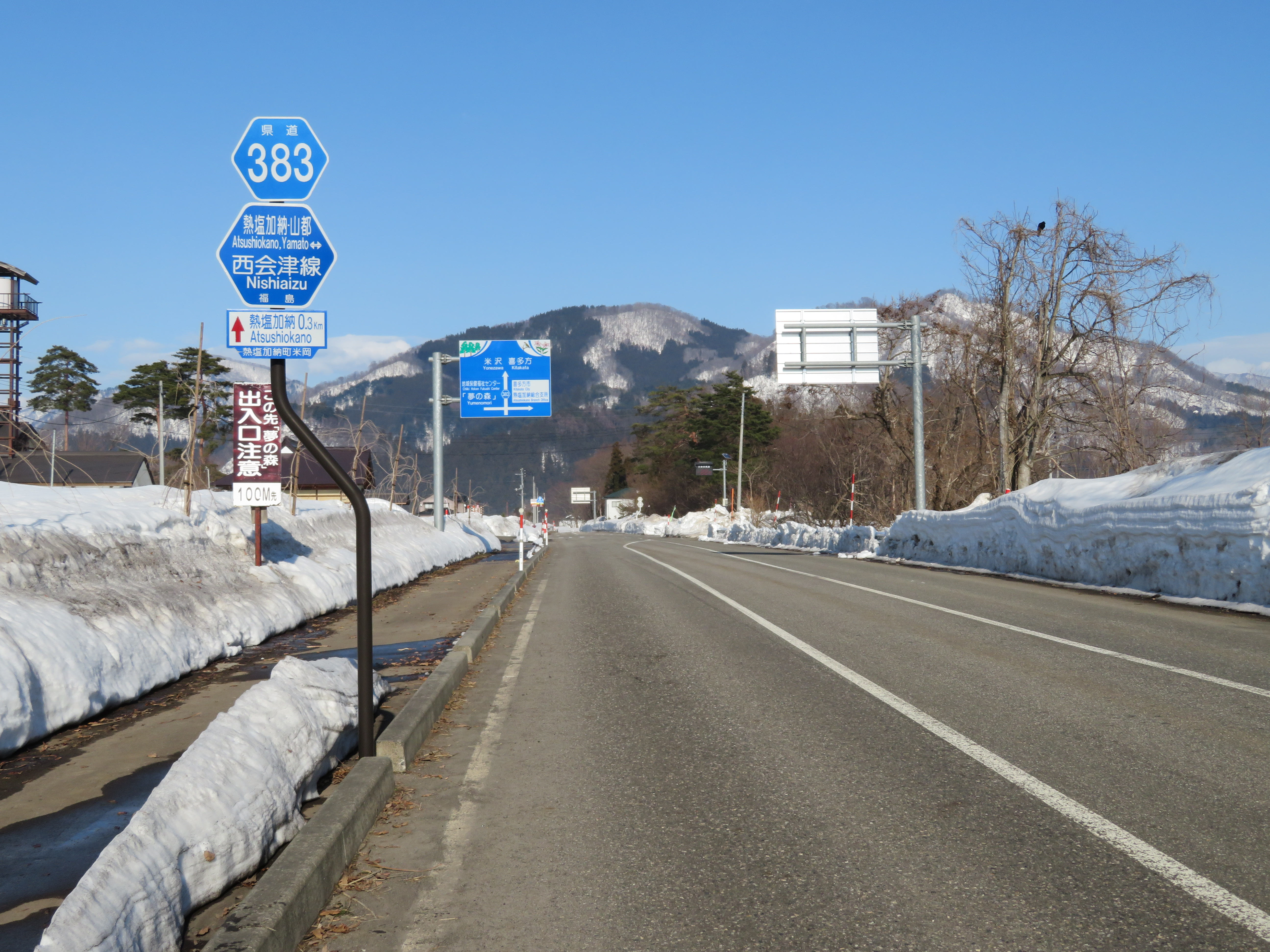 福島県道383号線喜多方市熱塩加納町米岡付近